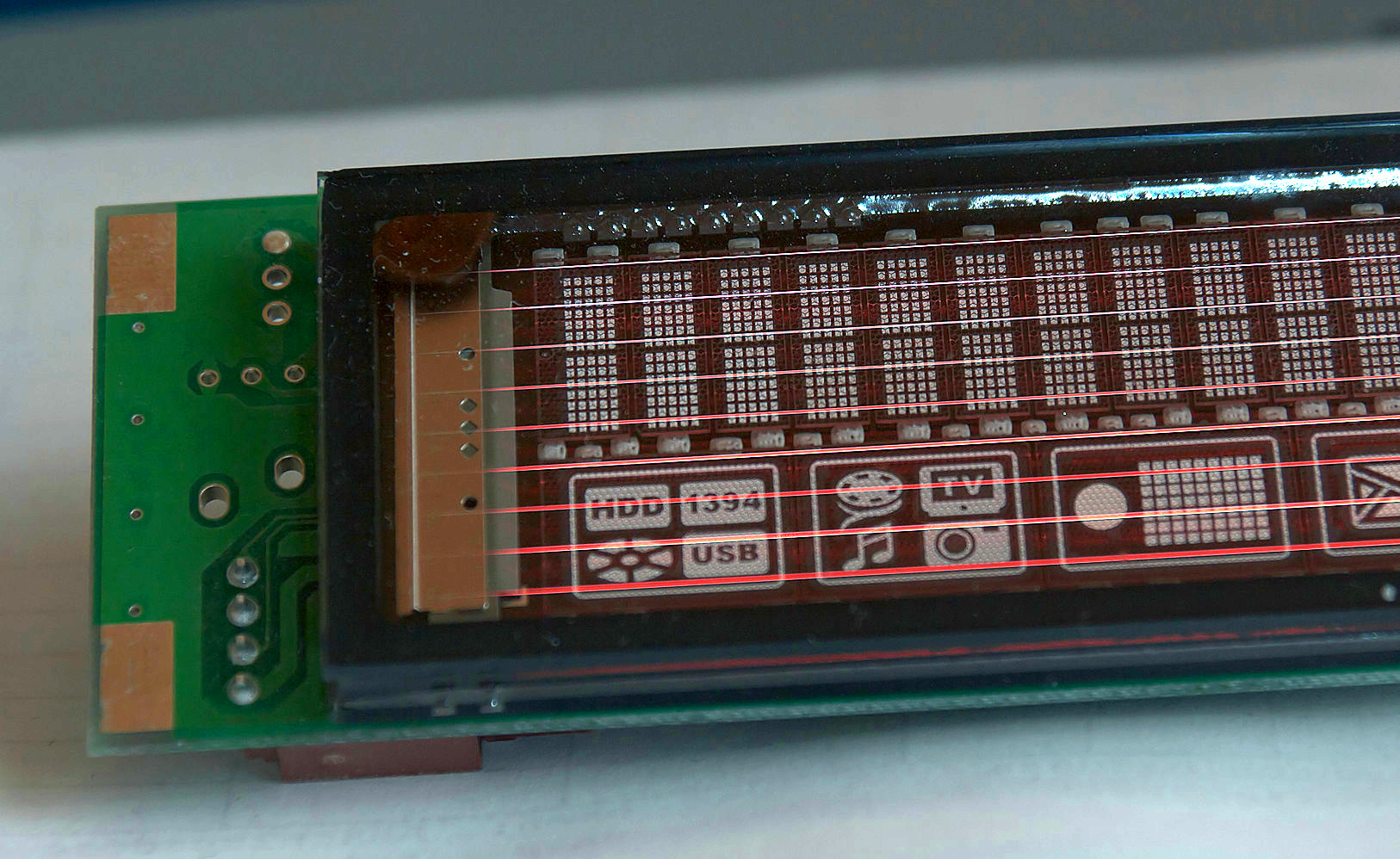 Heizdrähte einer Fluoreszenzanzeige. Sichtbar gemacht durch 30sek. Belichtungszeit. Das Display ist ein Futaba M18ST05B